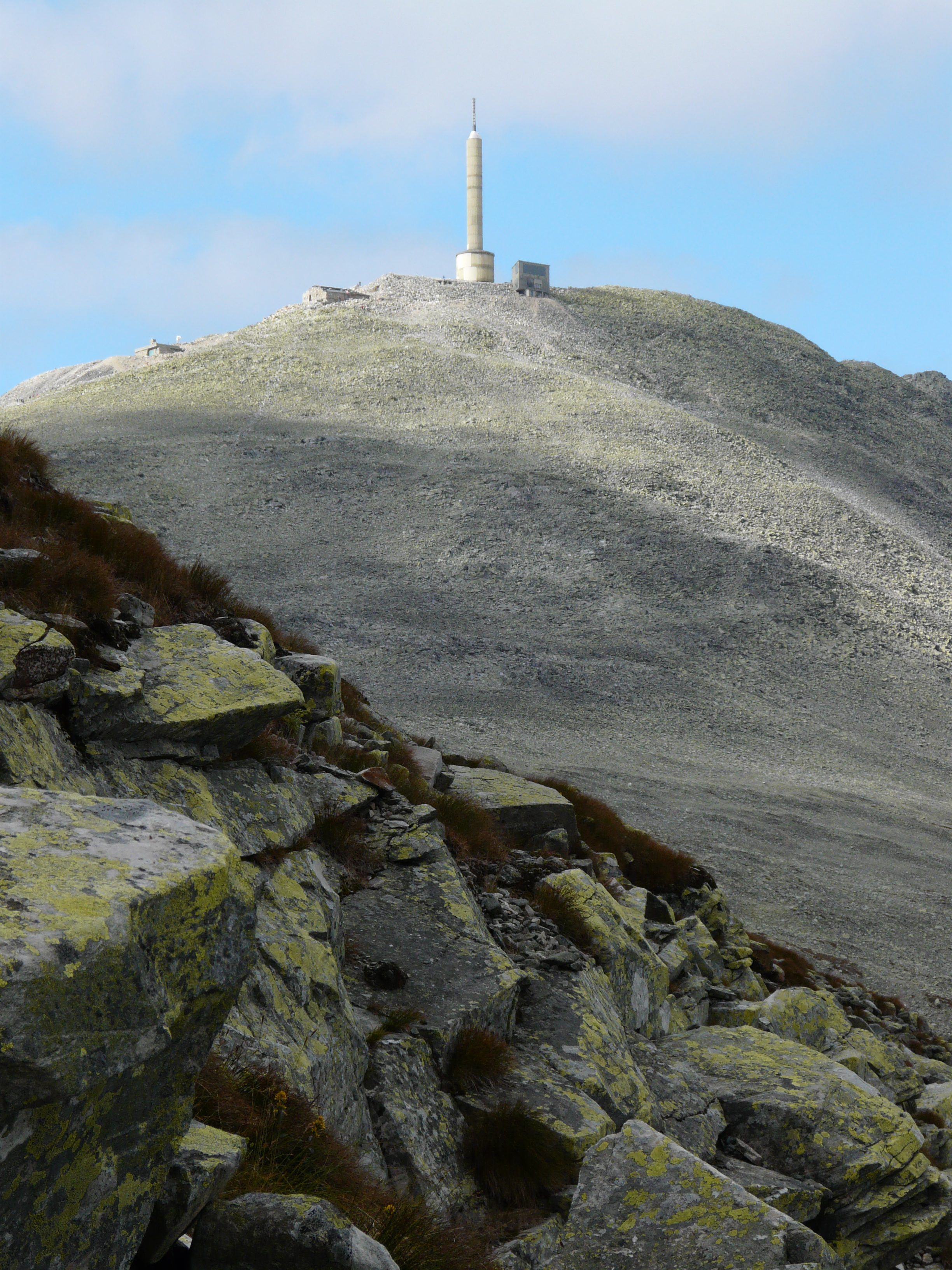 Gaustatoppen